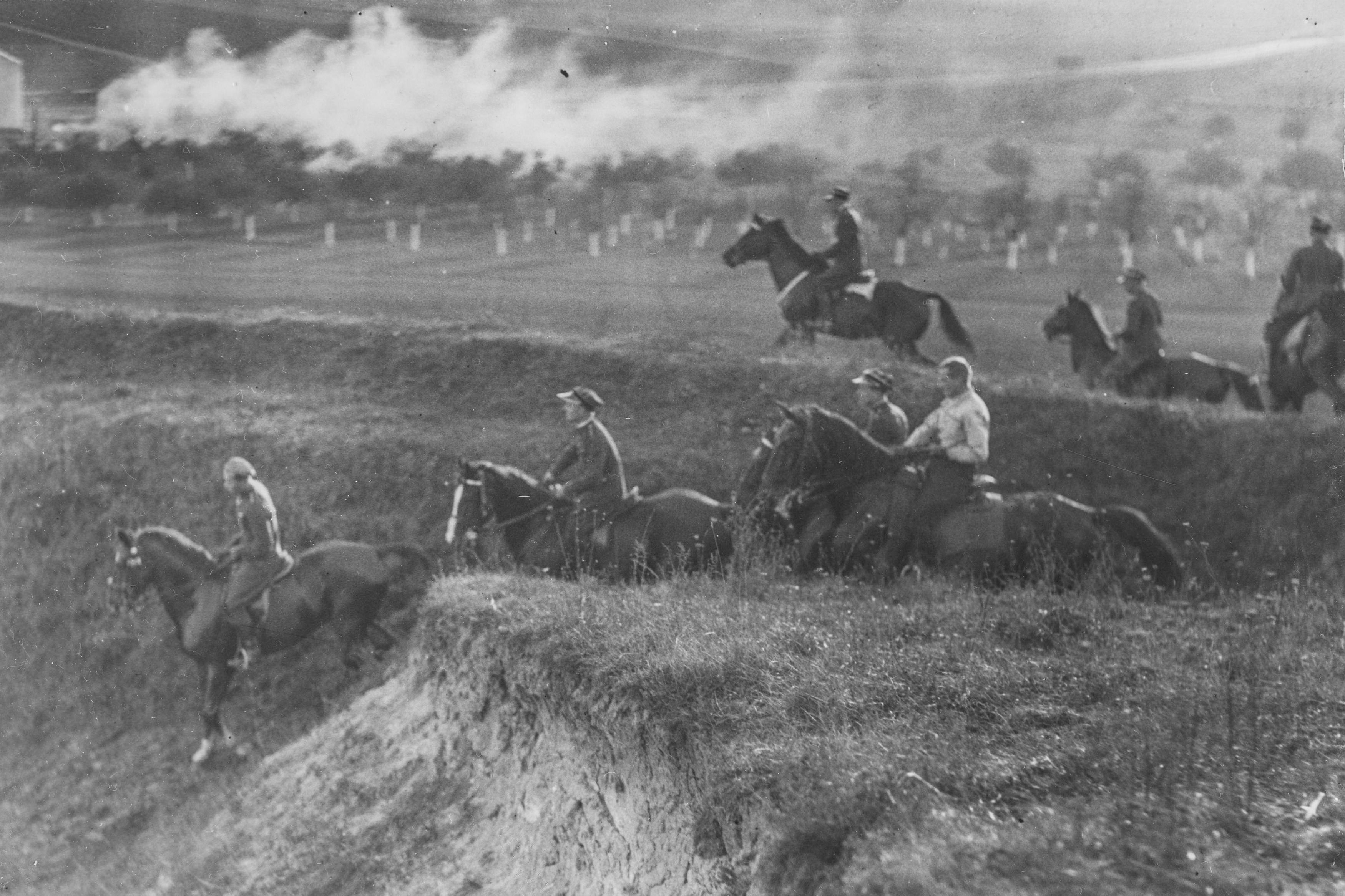 Bieg myśliwski św. Huberta w 5 Pułku Artylerii Ciężkiej w Krakowie - uczestnicy biegu w terenie; listopad 1934 r. Koncern Ilustrowany Kurier Codzienny - Archiwum Ilustracji. Sygnatura: 1-W-1525